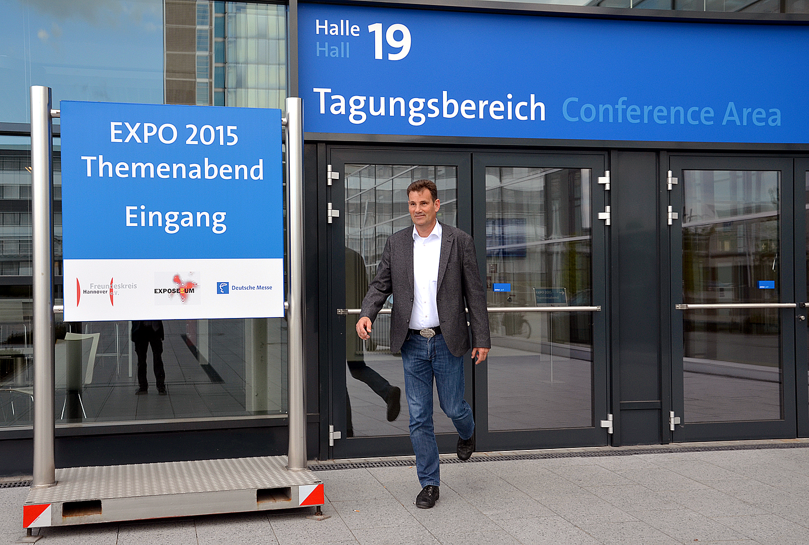 Thomas Kritscher, Anzeigenleiter der Neuen Deister-Zeitung, hier vor dem Eingang zur Halle 19 des Messegeländes Hannover am Expo 2015 Themenabend, zu dem die Deutsche Messe AG, das EXPOSEEUM und der Freundeskreis Hannover geladen hatte ...